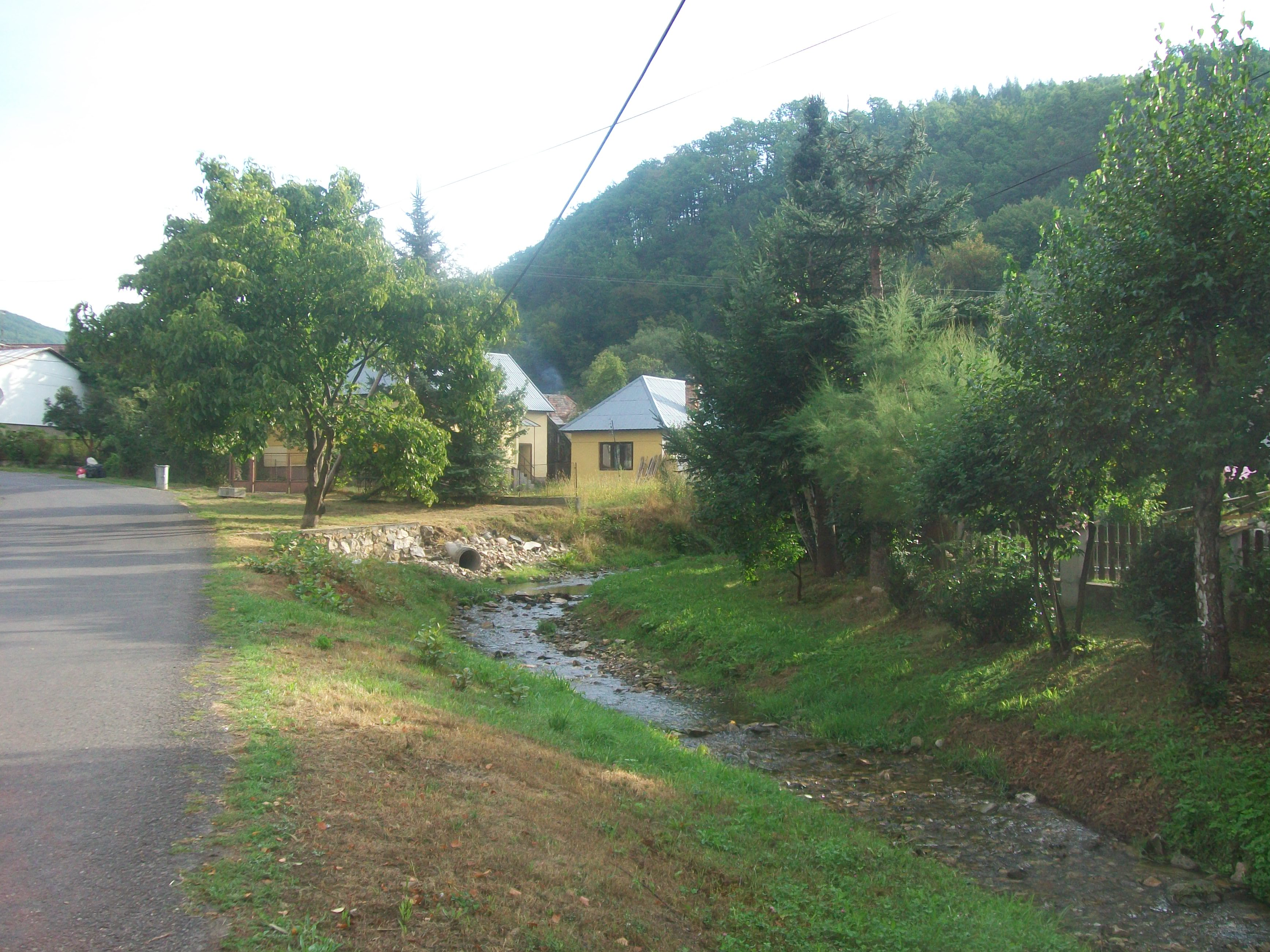 Vrbinský potok pretekajúci obcou Kotmanová